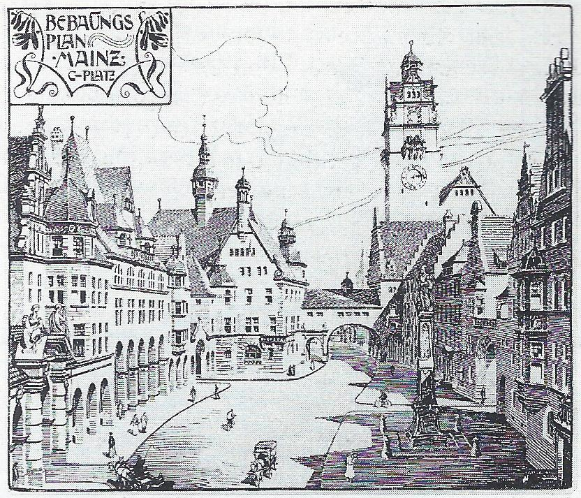 Bild des C-Platzes auf dem Bebauungsplan der Denkmalzone Albinistraße von Friedrich Pützer (1871–1922)